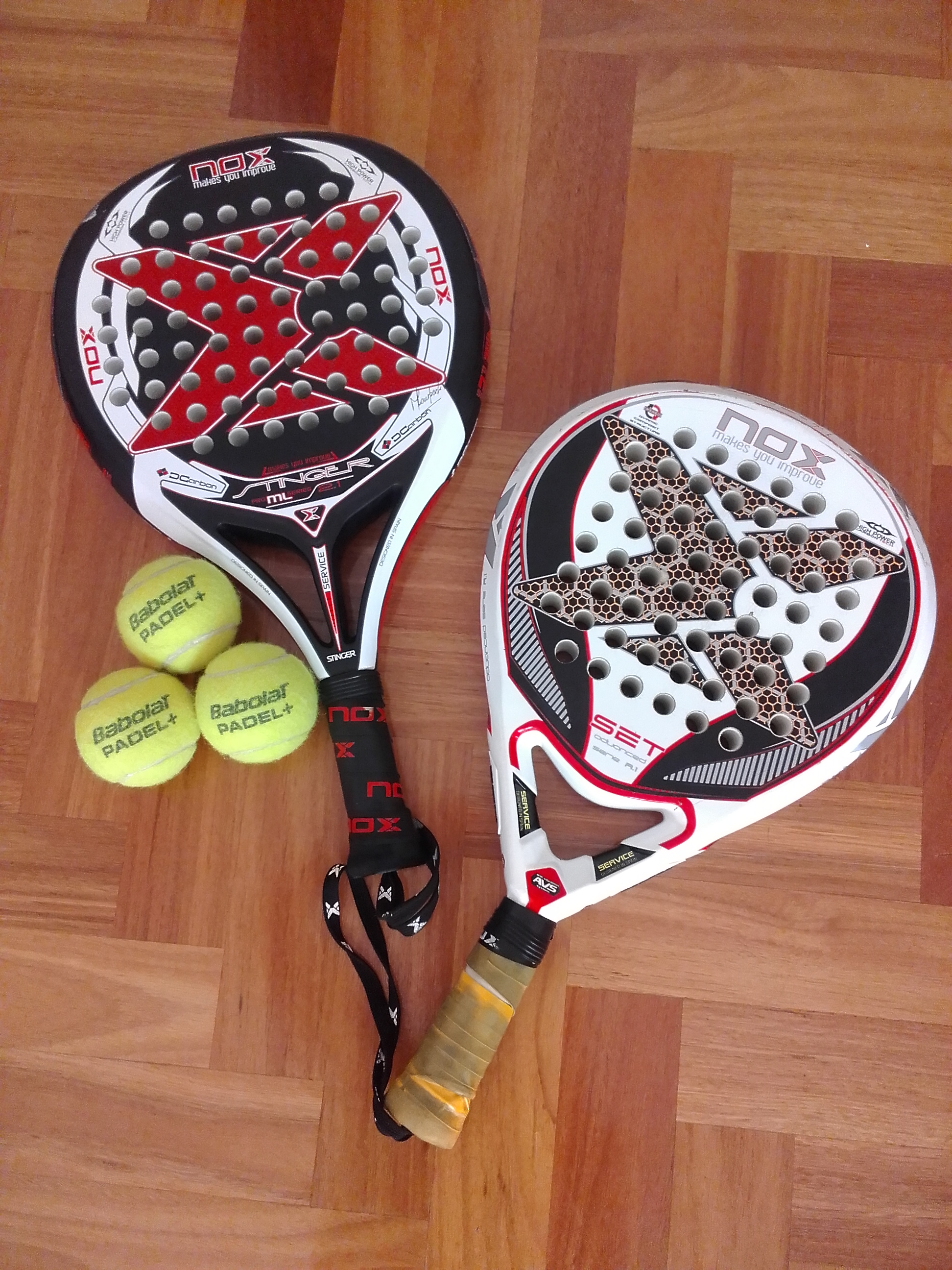 'n Voorstelling van 'n padelrakket en balle.